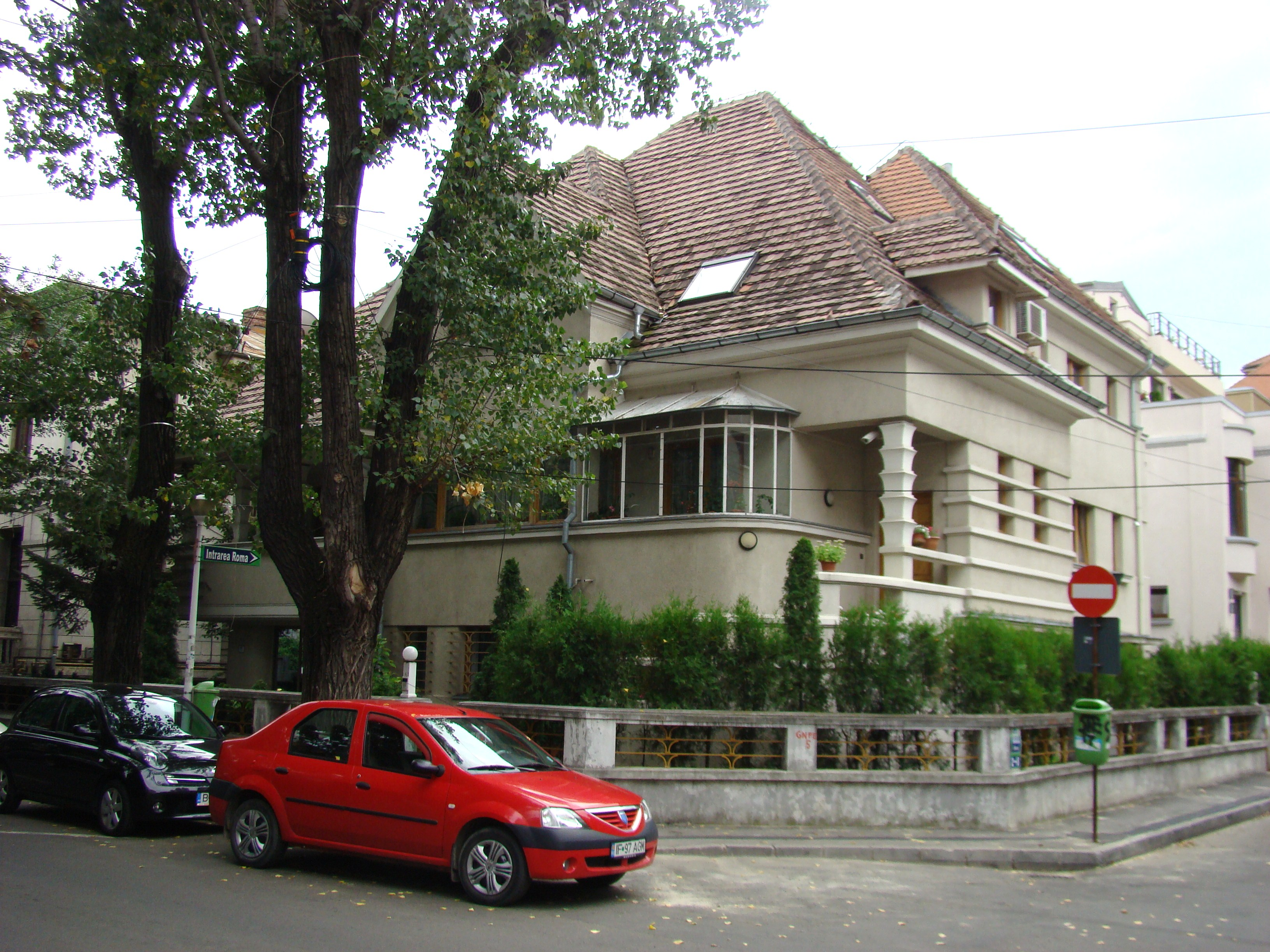 Clădire monument istoric, str. Roma, nr. 15